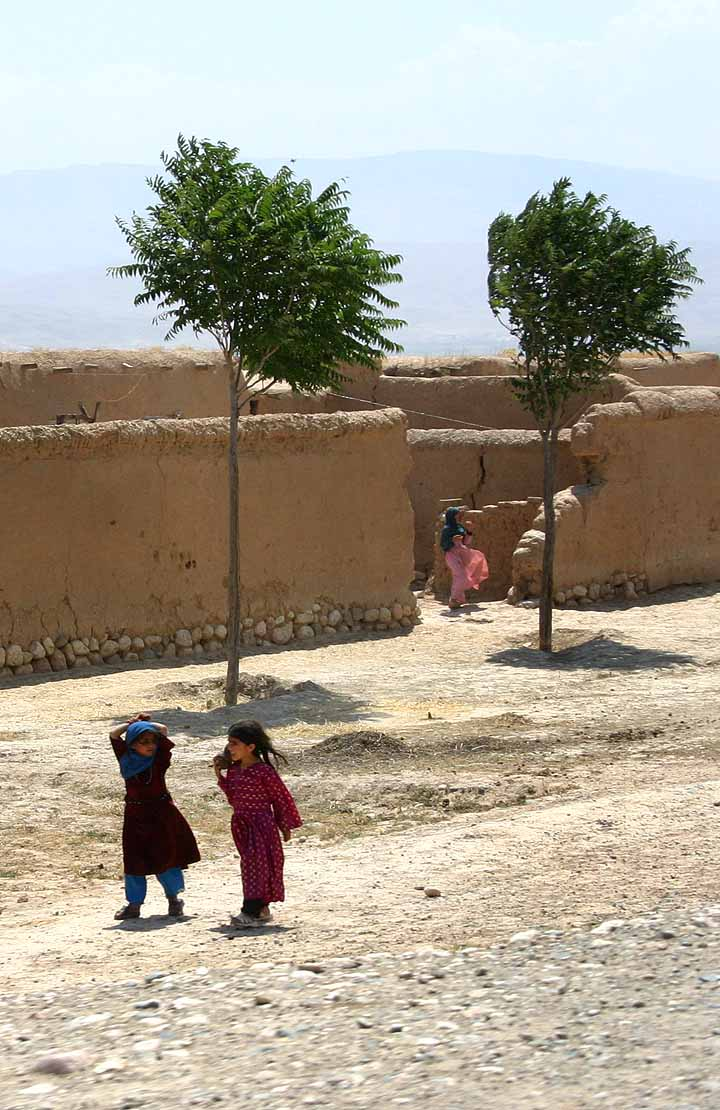 Children walking in Afghanistan